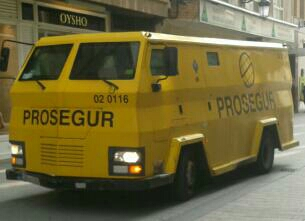 Vehiculo blindado de transporte de la compañia